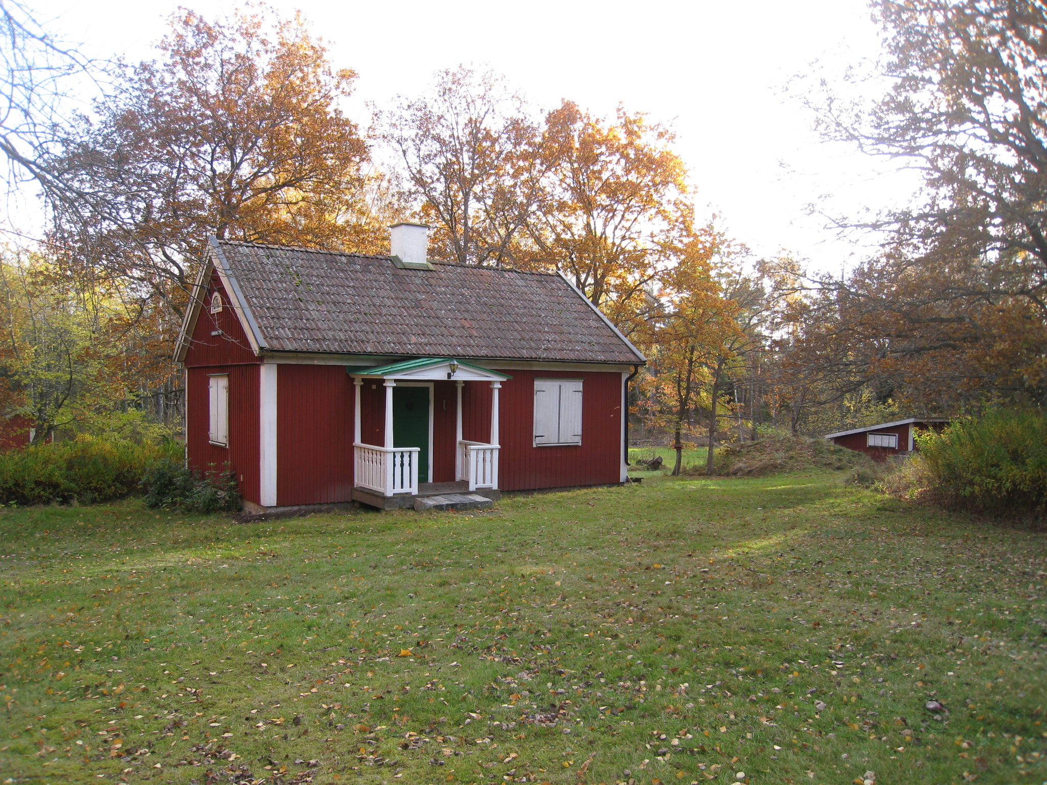 Nuvarande bostadshuset vid Henriksdals torp i Görvälns naturreservat, Järfälla.